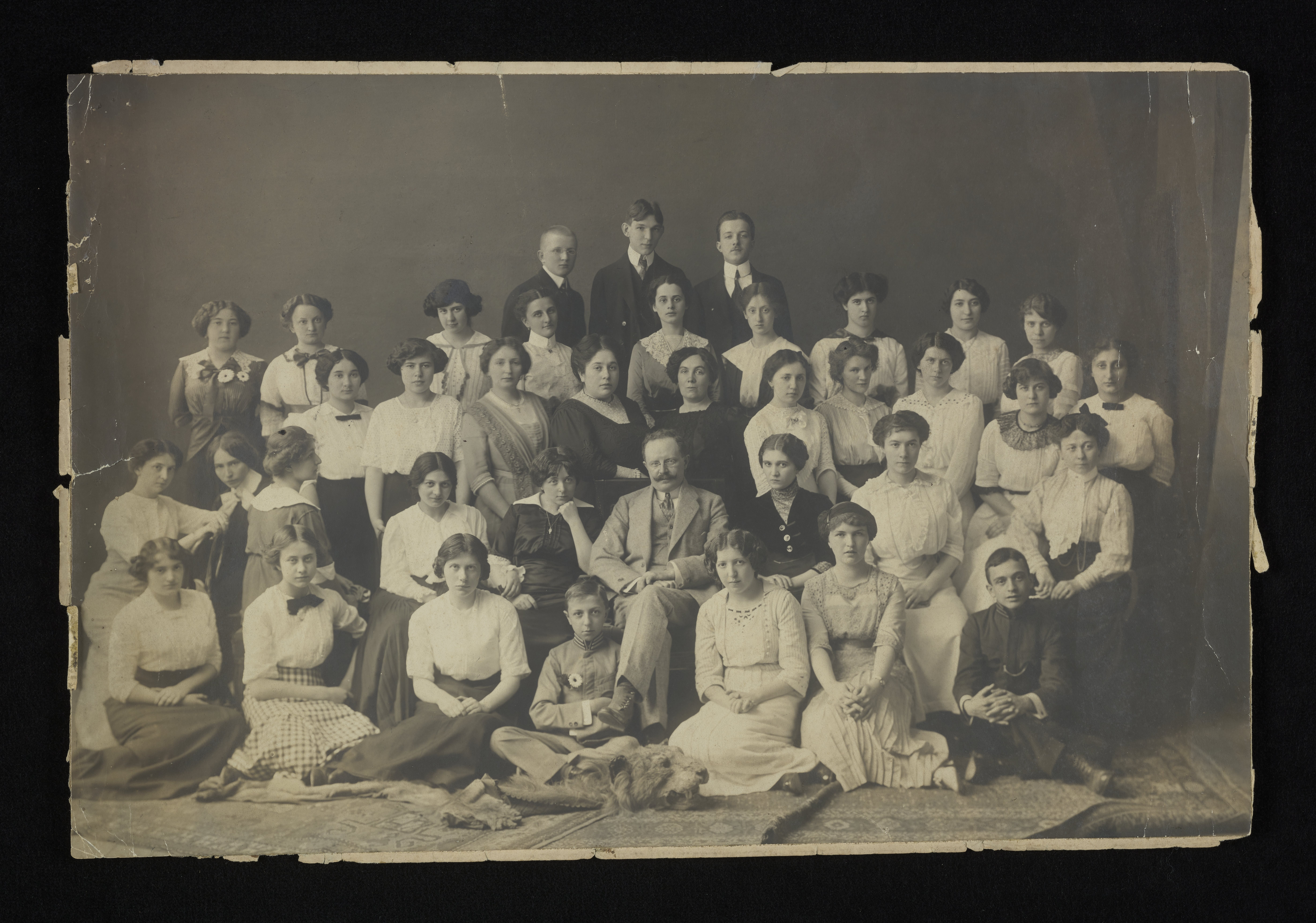 Jerzy Lalewicz z uczennicami, przed 1912 r.